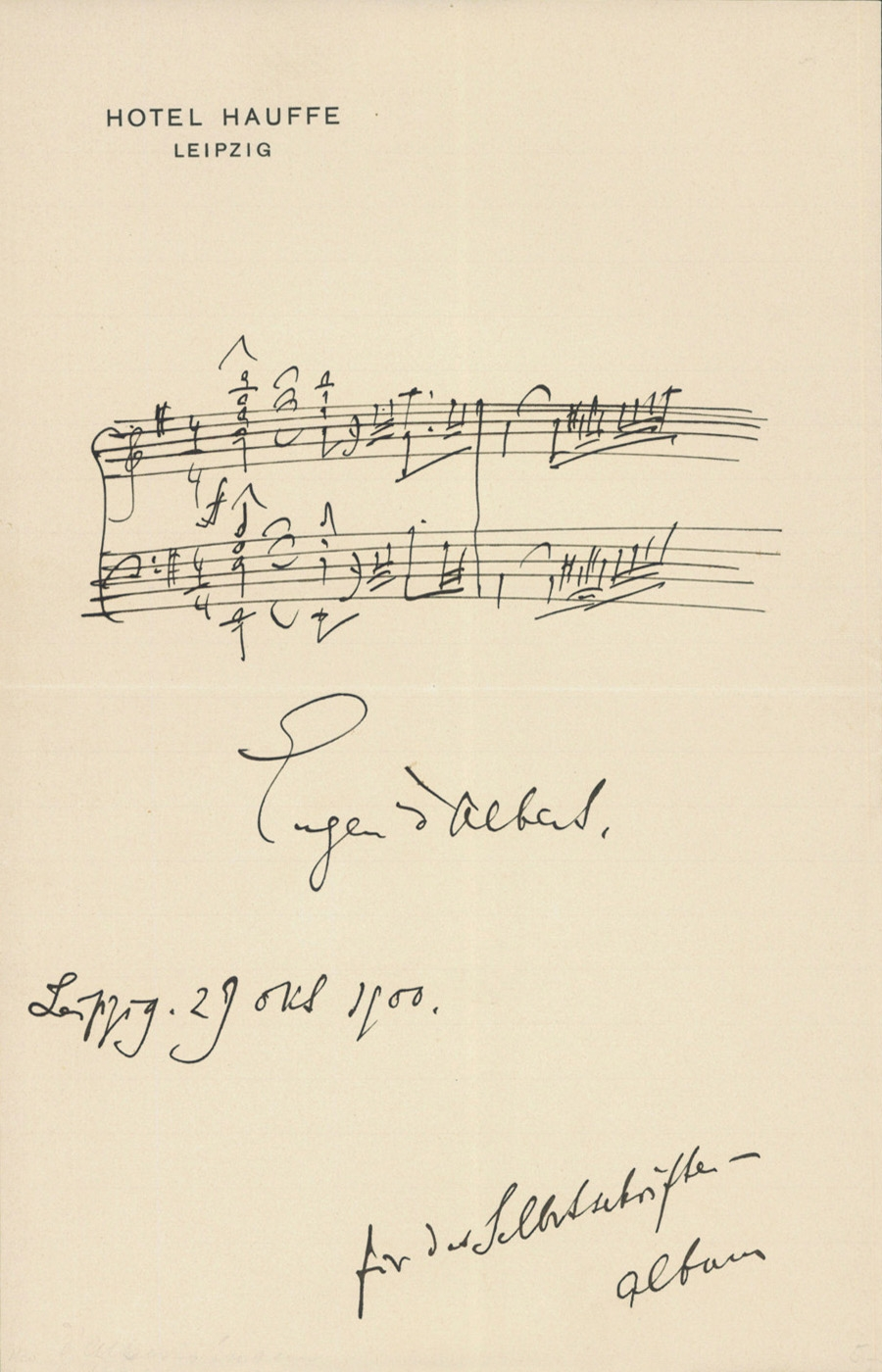 Autograph von Eugen d'Albert auf einem Blatt mit dem Briefkopf des Hotels Hauffe in Leipzig